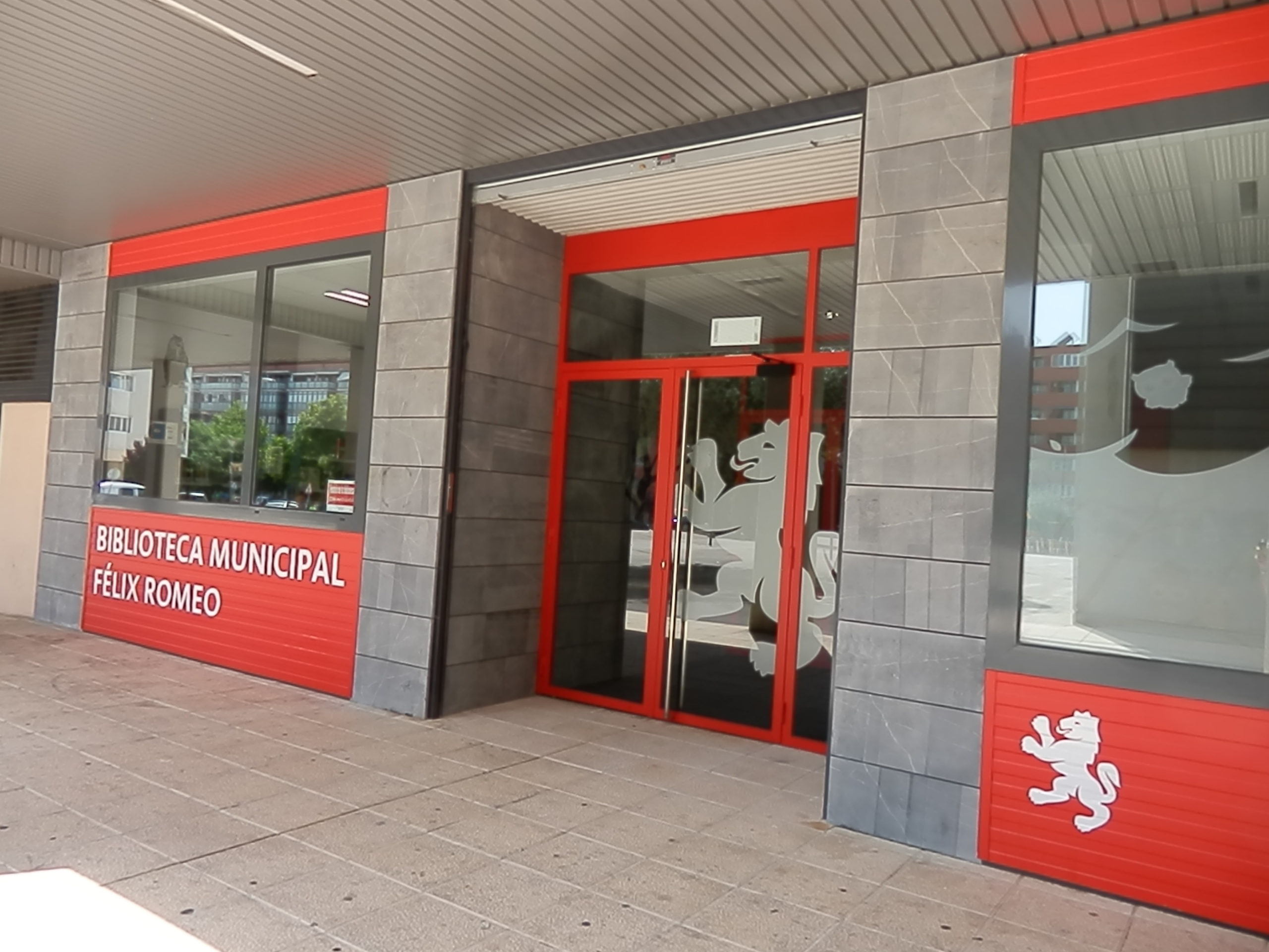 Biblioteca municipal Félix Romeo situada en la Plaza de la Poesía de Zaragoza.